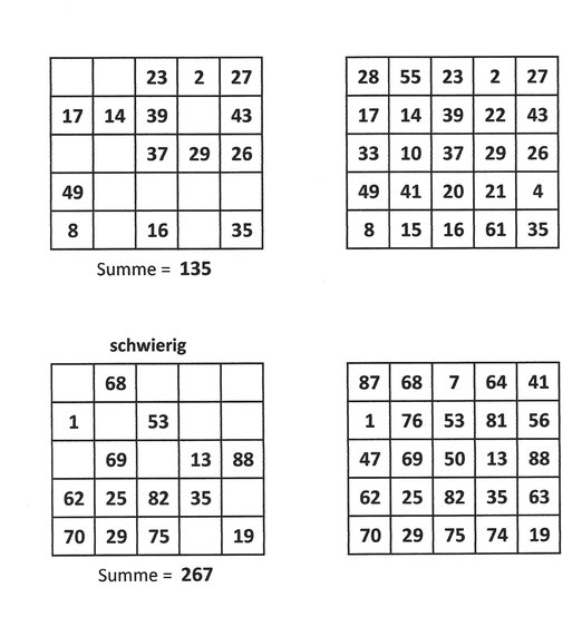 Beispiele und Lösungen